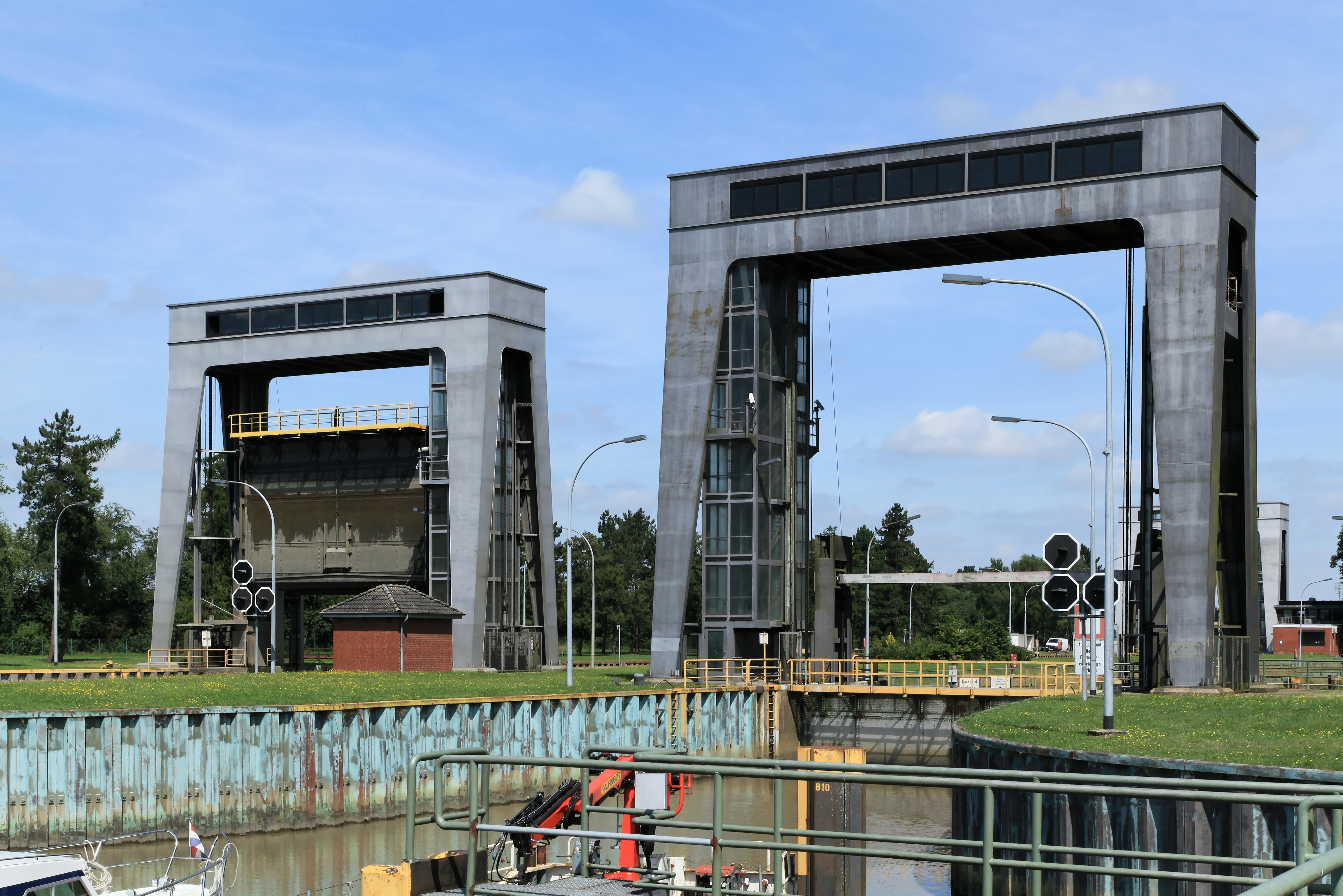 Schleuse Herbrum, Zur Emsschleuse in Herbrum, Papenburg